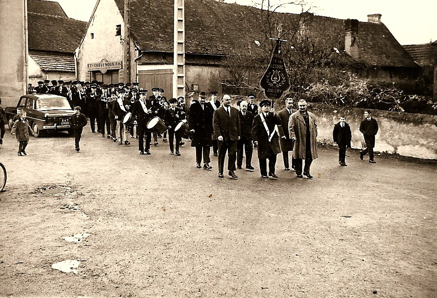 Jaligny-sur Besbre (France) - La Fanfare de la Besbre au début des années 1960 Collection personnelle